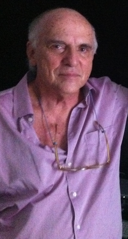 Diretor brasileiro, Antonio Fontoura.